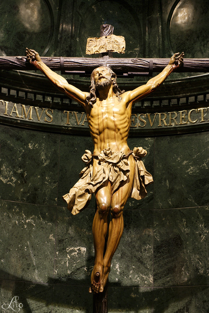 Fotografía realizada por Manuel Francisco Álvarez Ruiz.